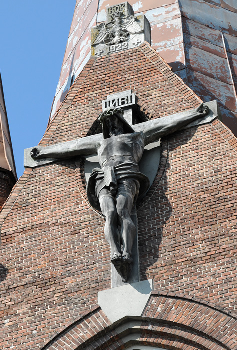 Костел Успення Пресвятої Богородиці